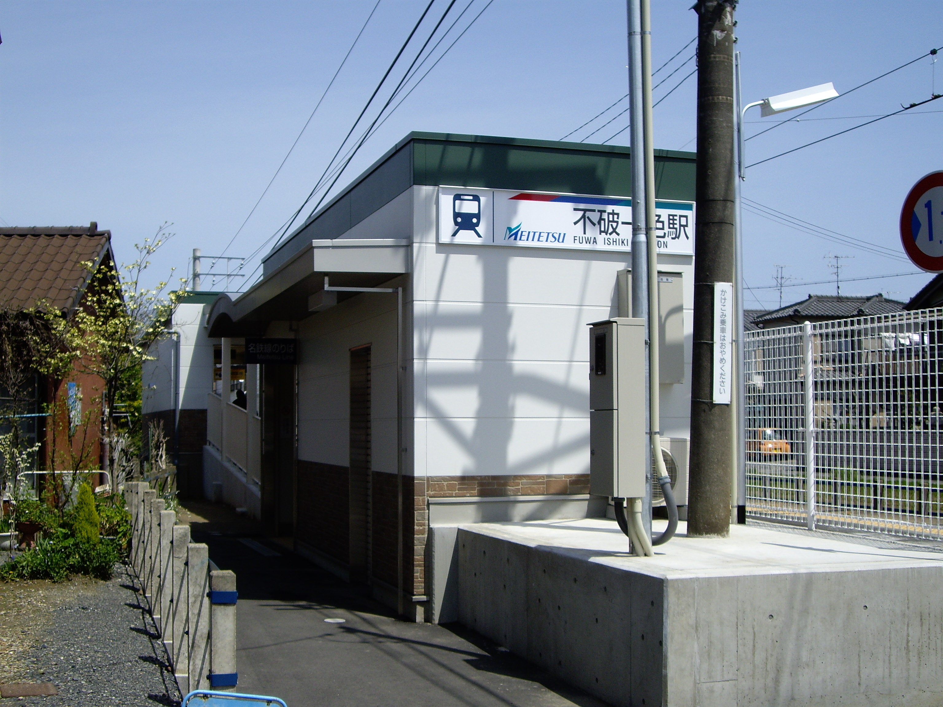 Fuwa ishiki Station(不破一色駅)